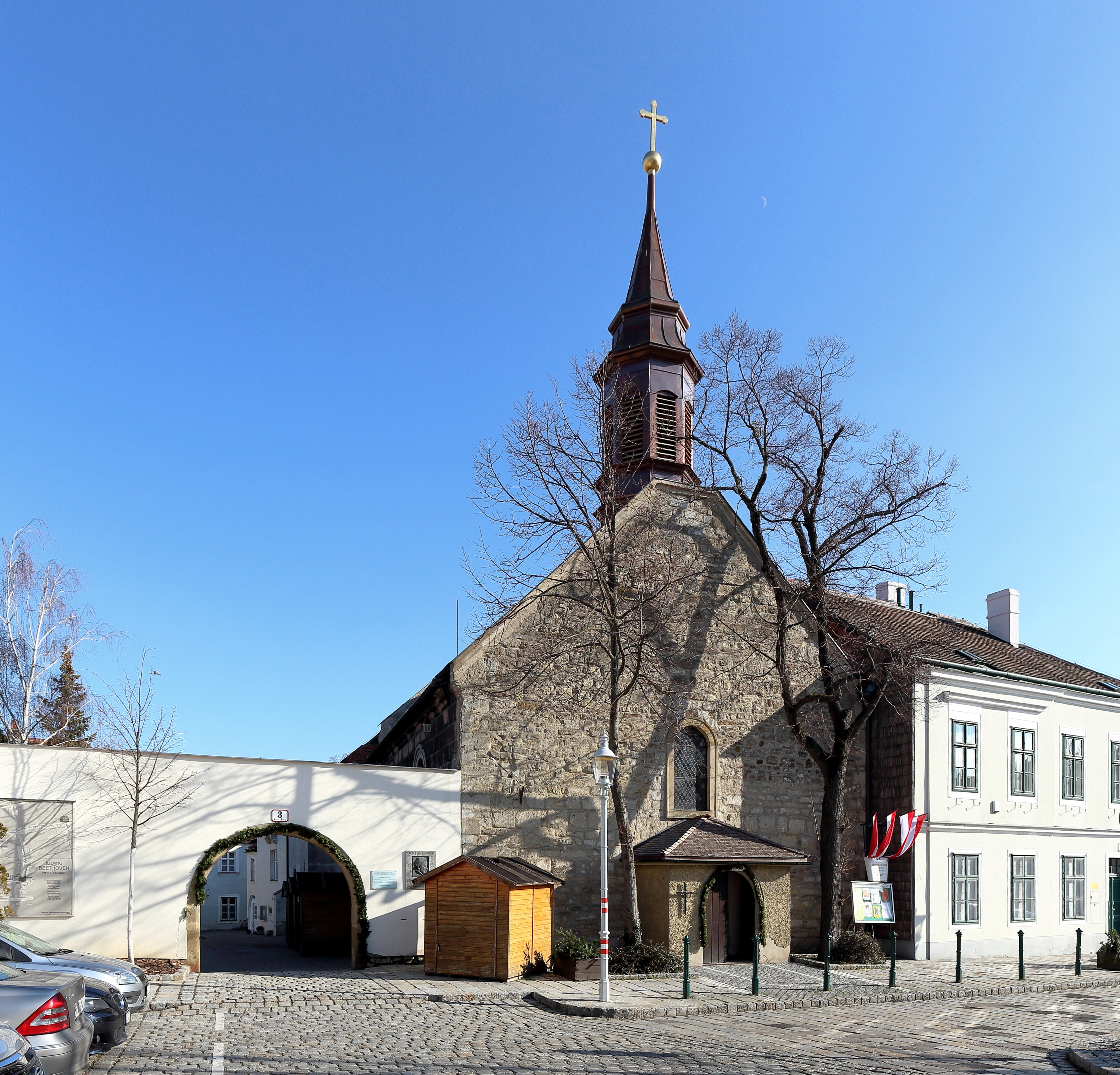 Nordwestansicht der Heiligenstädter Kirche St. Jakob im 19. Wiener Gemeindebezirk Döbling.Die einschiffige Kirche ist eine der ältesten Wiens. Sie wurde über Resten eines römischen Gebäudes errichtet und ist teilweise noch in ihrer ursprünglich Form erhalten. Um 1100 erfolgte ein rechteckiger Choranbau (mit einem Achsknick nach links) und im 12. Jahrhundert erweiterte man das Langhaus Richtung Westen. Diese Form bildet den Kern der heutigen Jakobskirche, die 1256 bereits urkundlich erwähnt wurde. Die Außenmauern der Kirche (unverputzte Bruch- und Bachsteine) zeigen noch romanische Formen, jedoch das Innere wurde barockisiert.